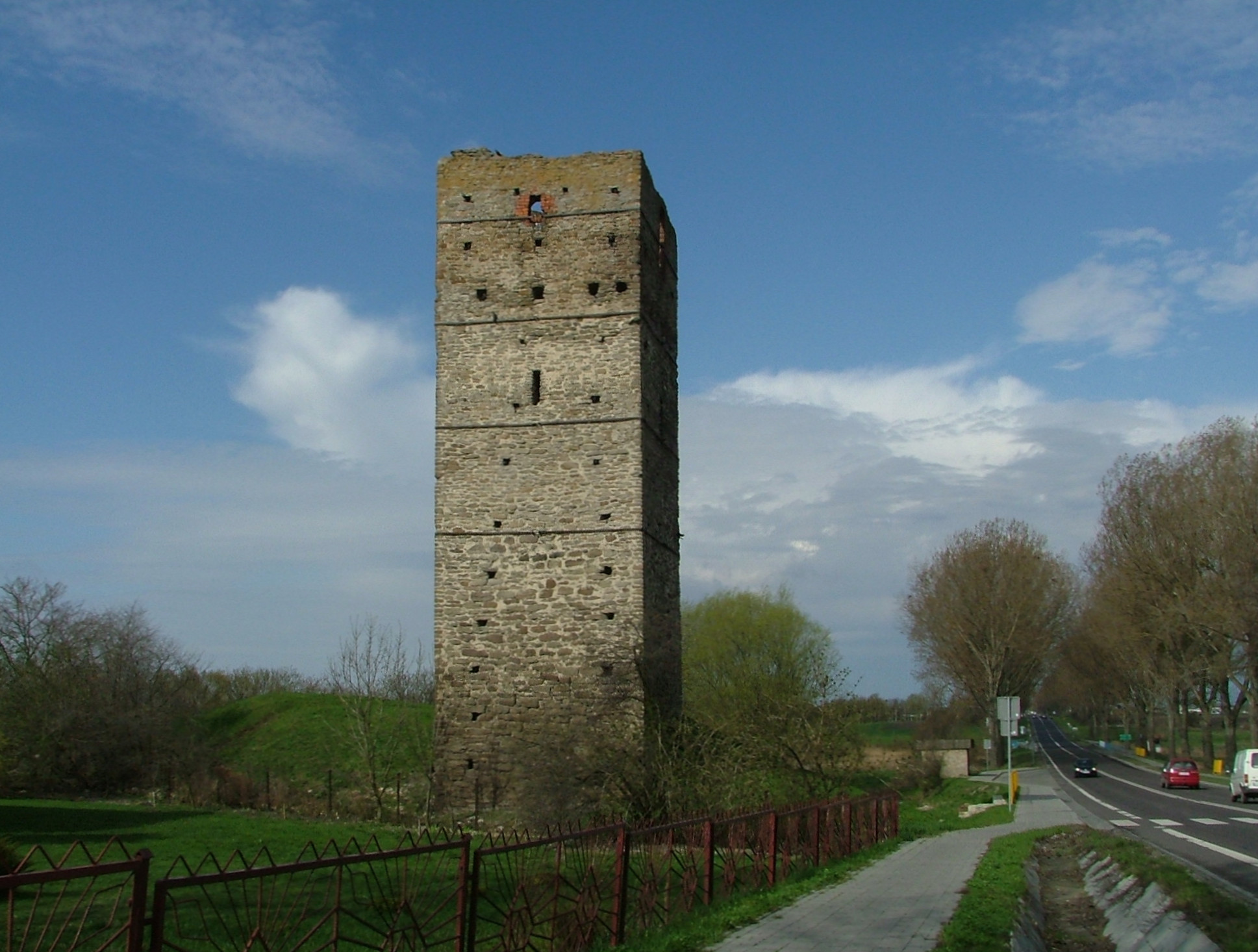 Stołpie, woj. lubelskie, wieża